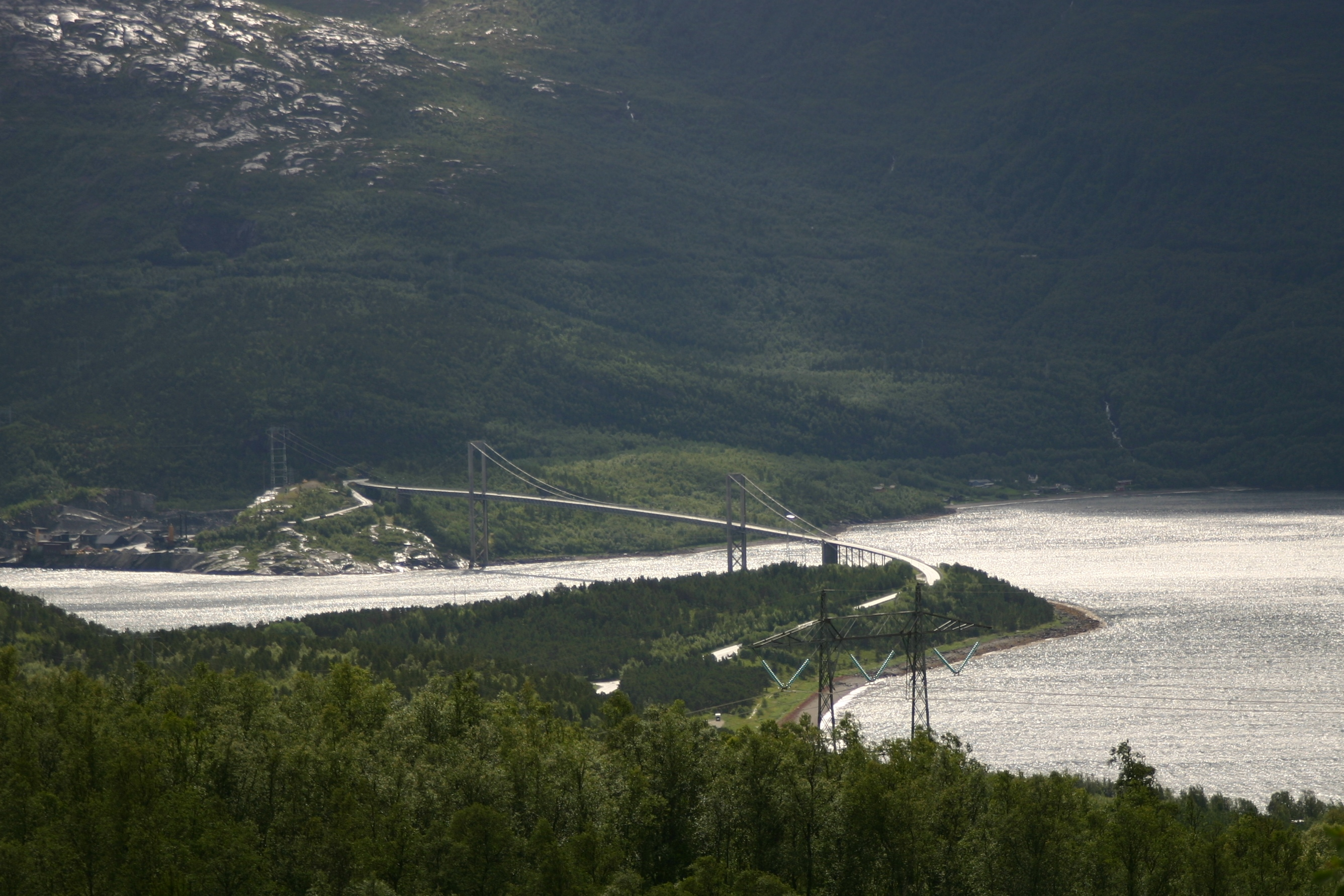 Rombak Bridge near Narvik in Norway